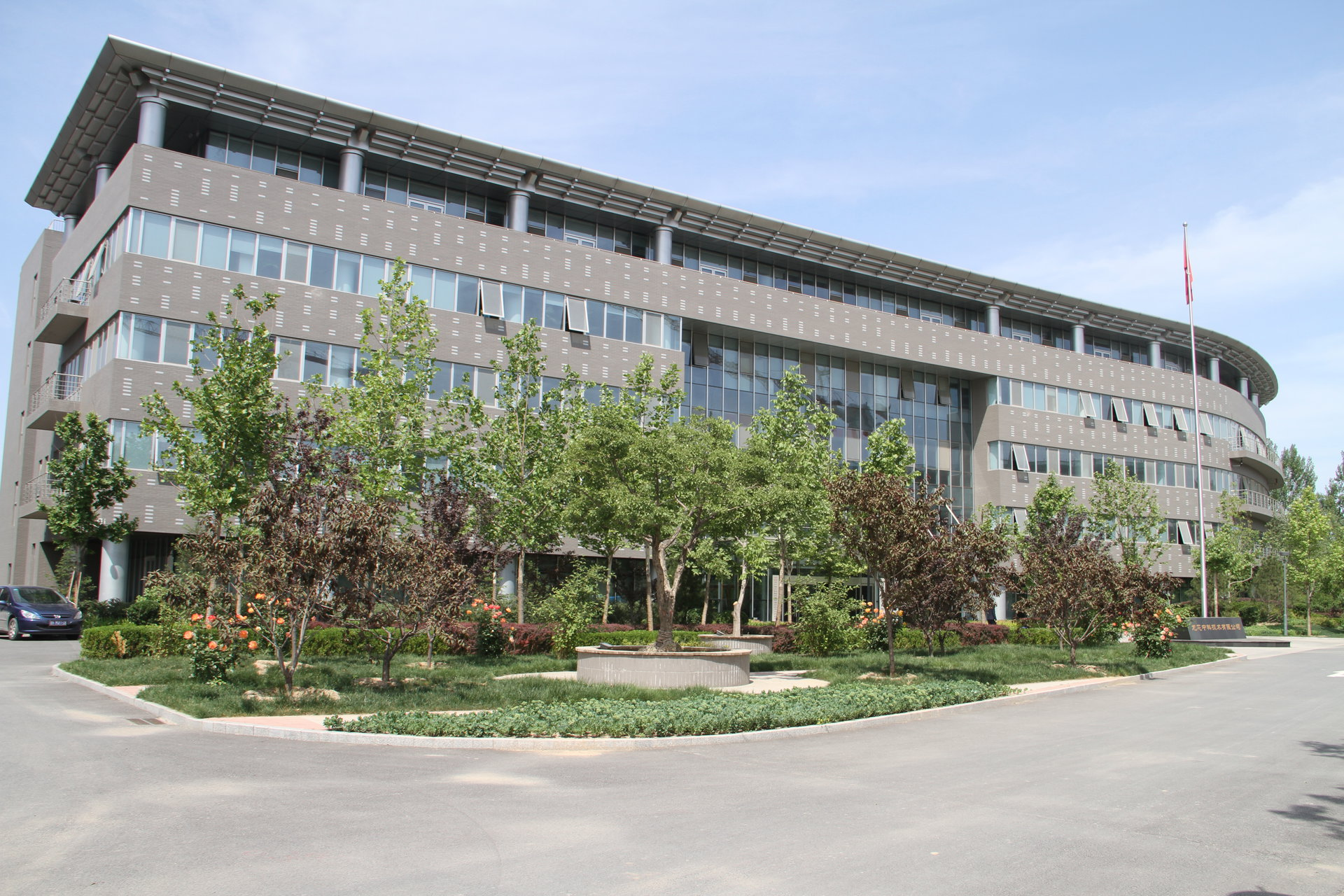 龙芯中科总部大楼